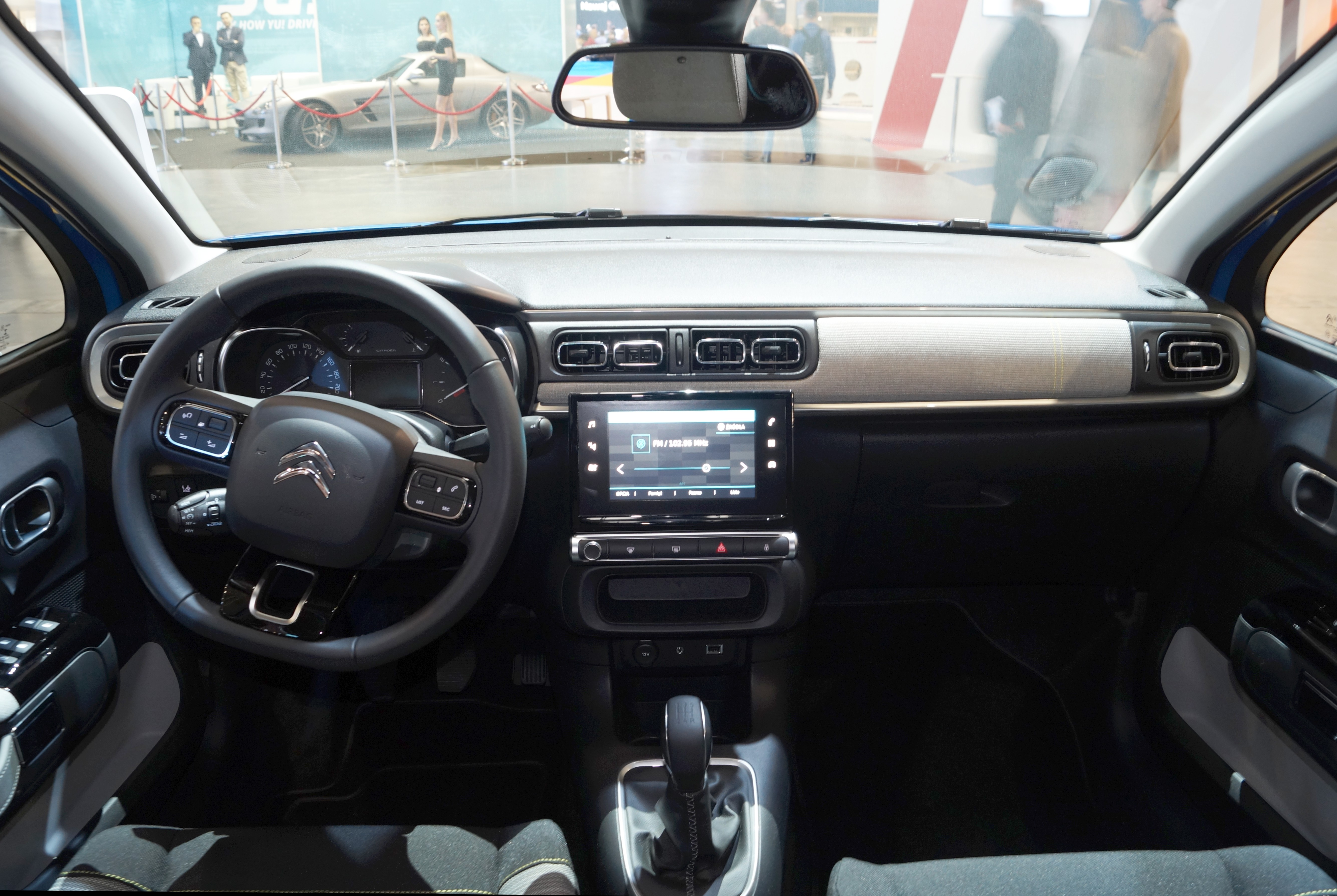 Wnętrze Citroëna C3 na Motor Show Poznań 2017.